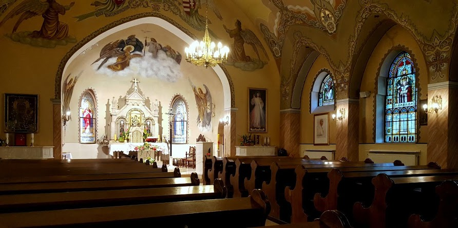 Kőbányai lengyel nemzetiségi templom, Budapest, X. Óhegy u. 11.